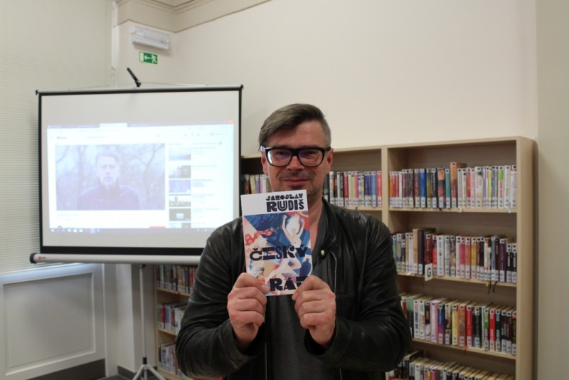 J. Rudiš